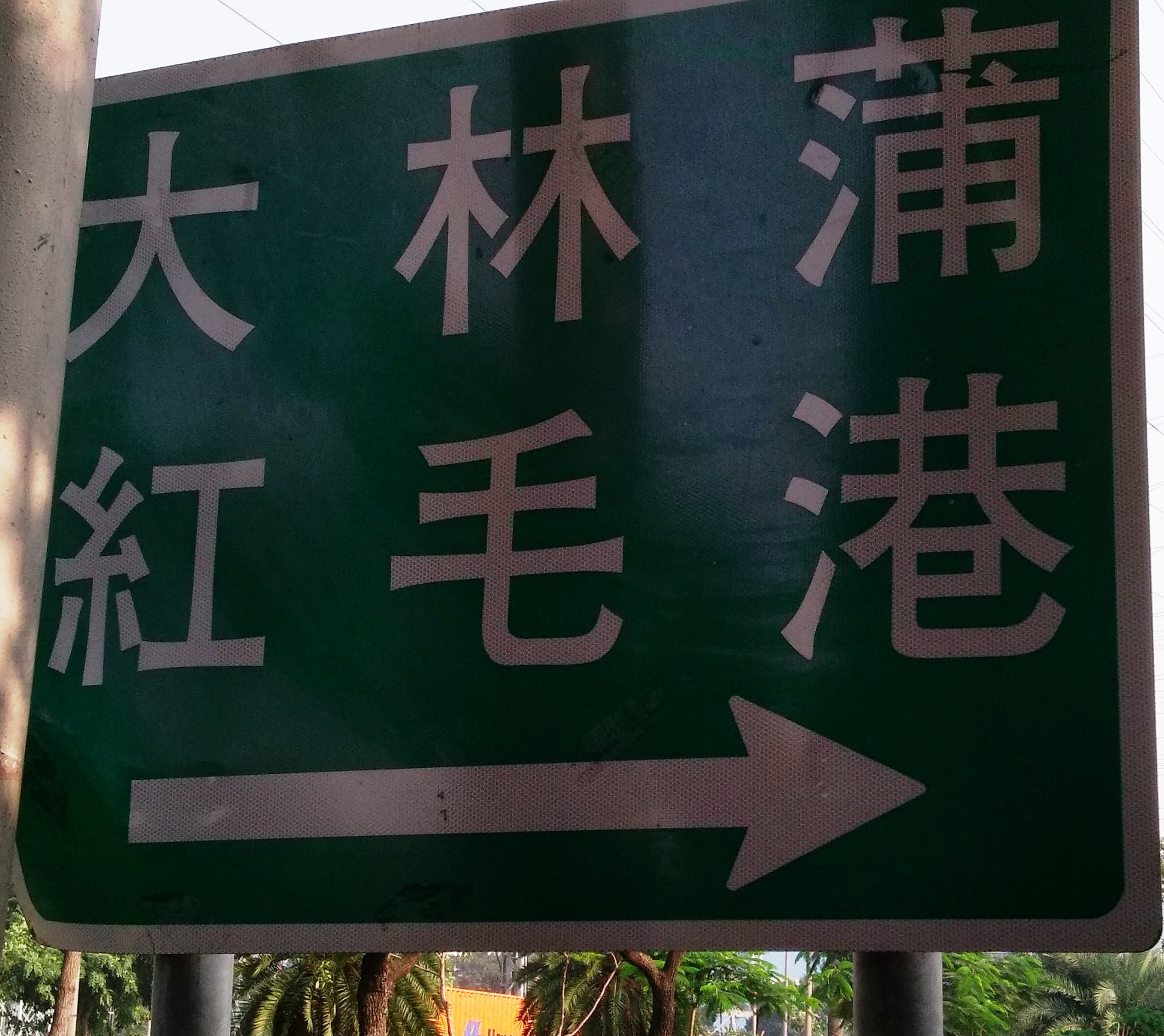 中文（台灣）: 位於沿海二路上大林蒲和紅毛港地名告示牌